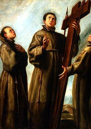 St. Goncalo Garcia (+1597), indischer Märtyrer in Nagasaki